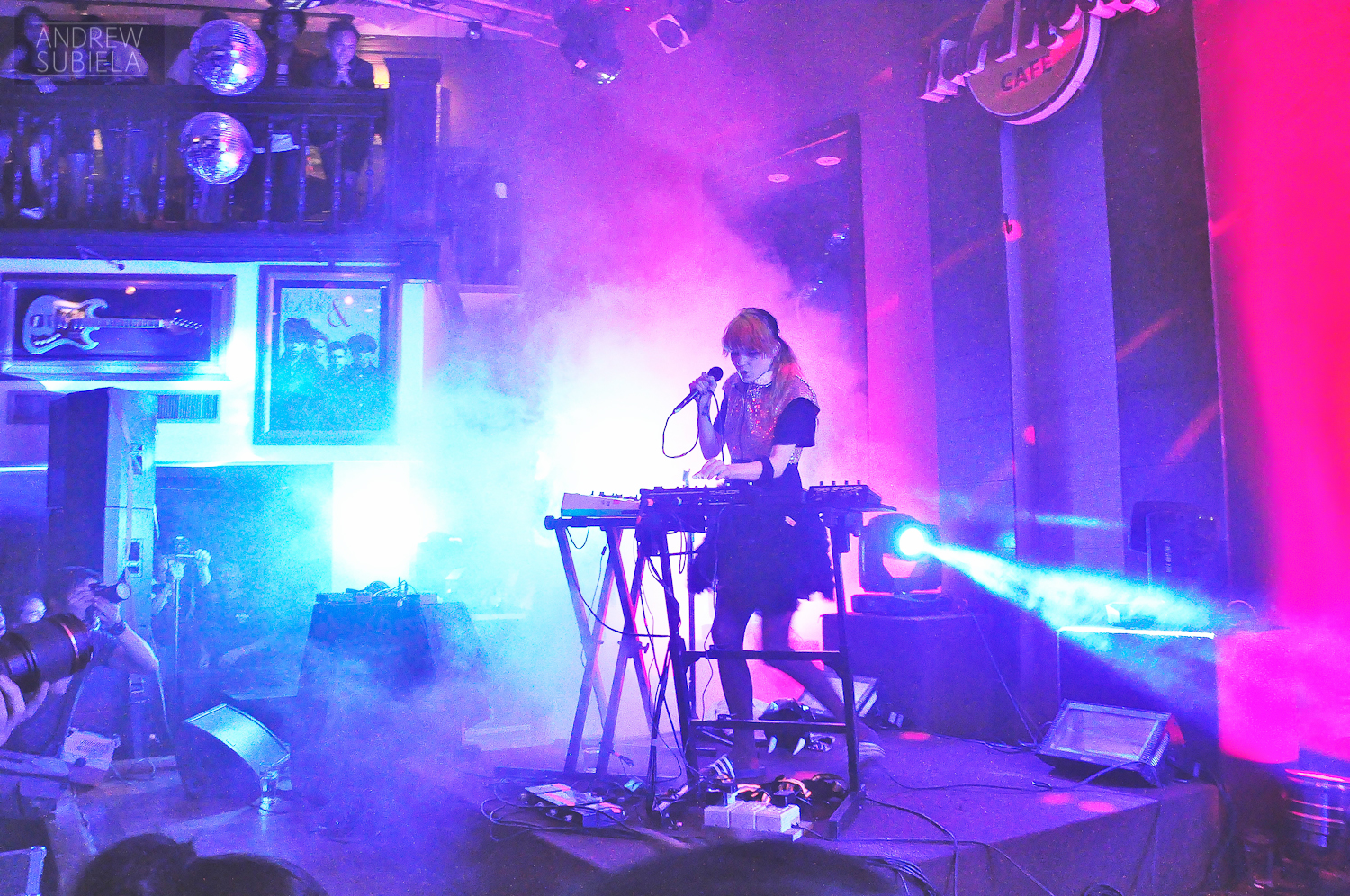 Grimes el 14 de marzo de 2013 en el Hard Rock Cafe Makati.